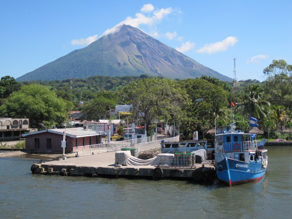 El puerto de Moyogalpa, Isla de Ometepe, Nicaragua.